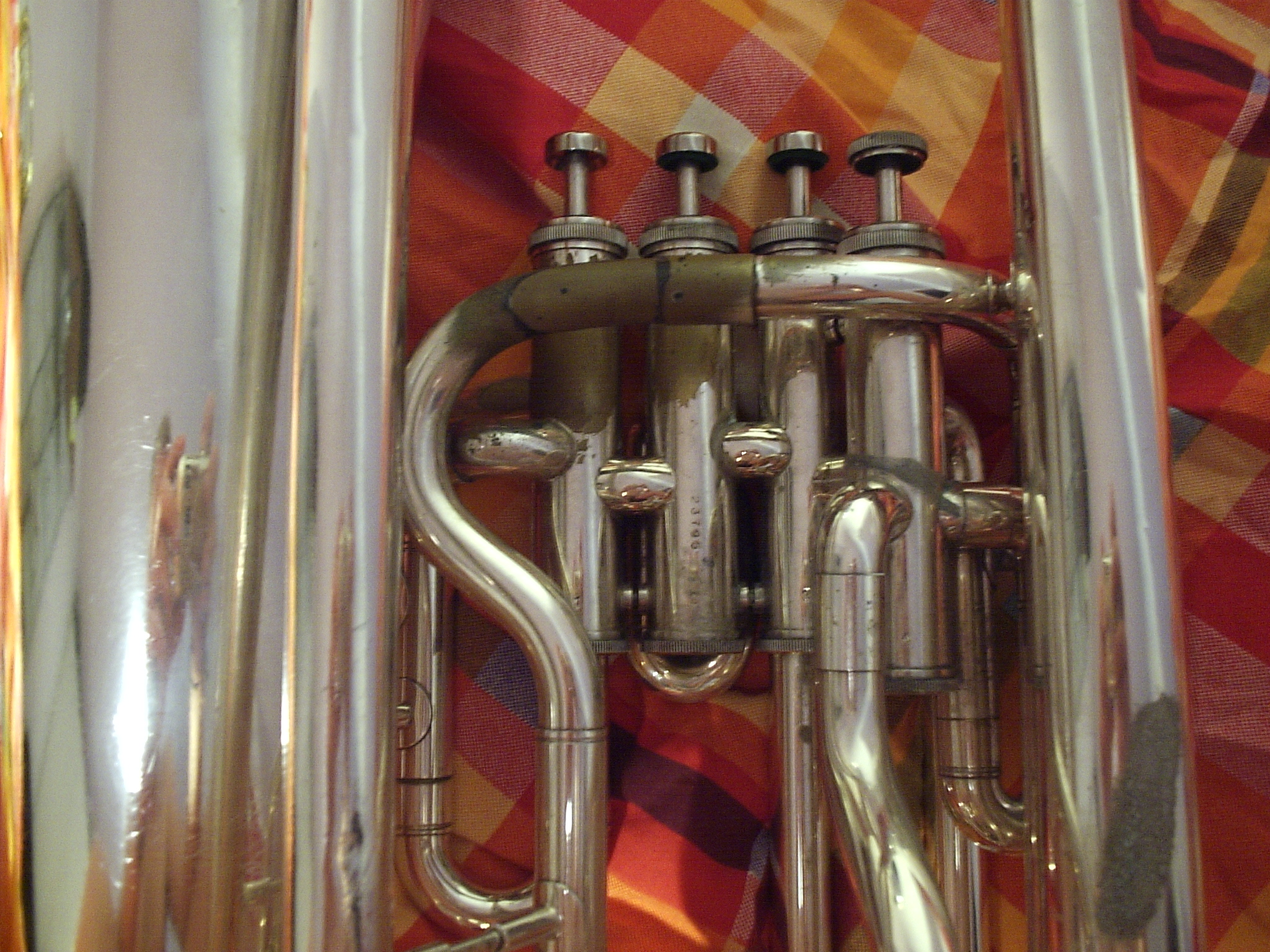 Kwartventiel euphonium